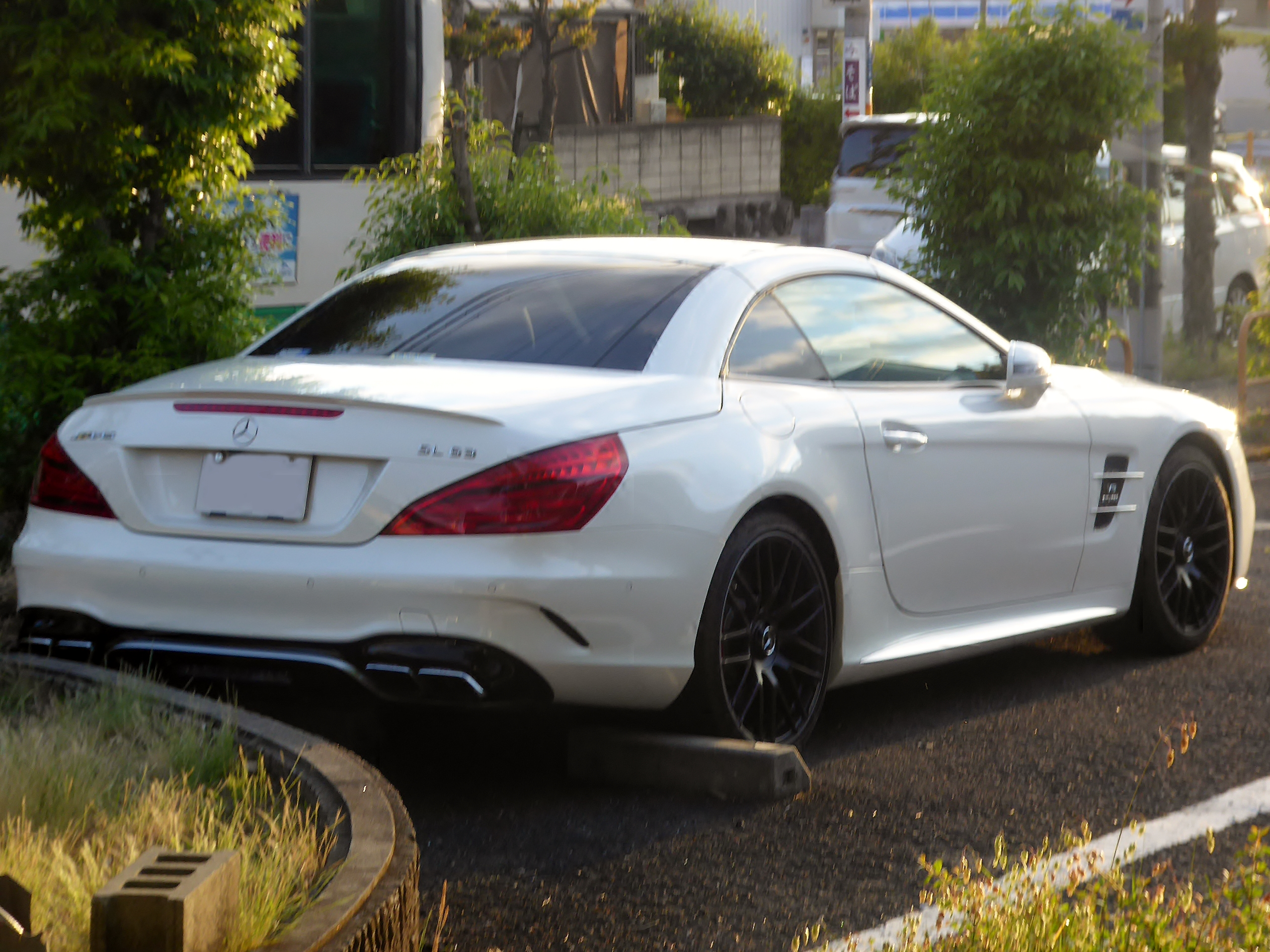 R231系メルセデスAMG・SL63をリアから撮影。